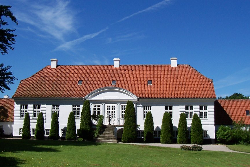 Pedersholm Herregaard i Vejle, Danmark. Foto fra 2005.